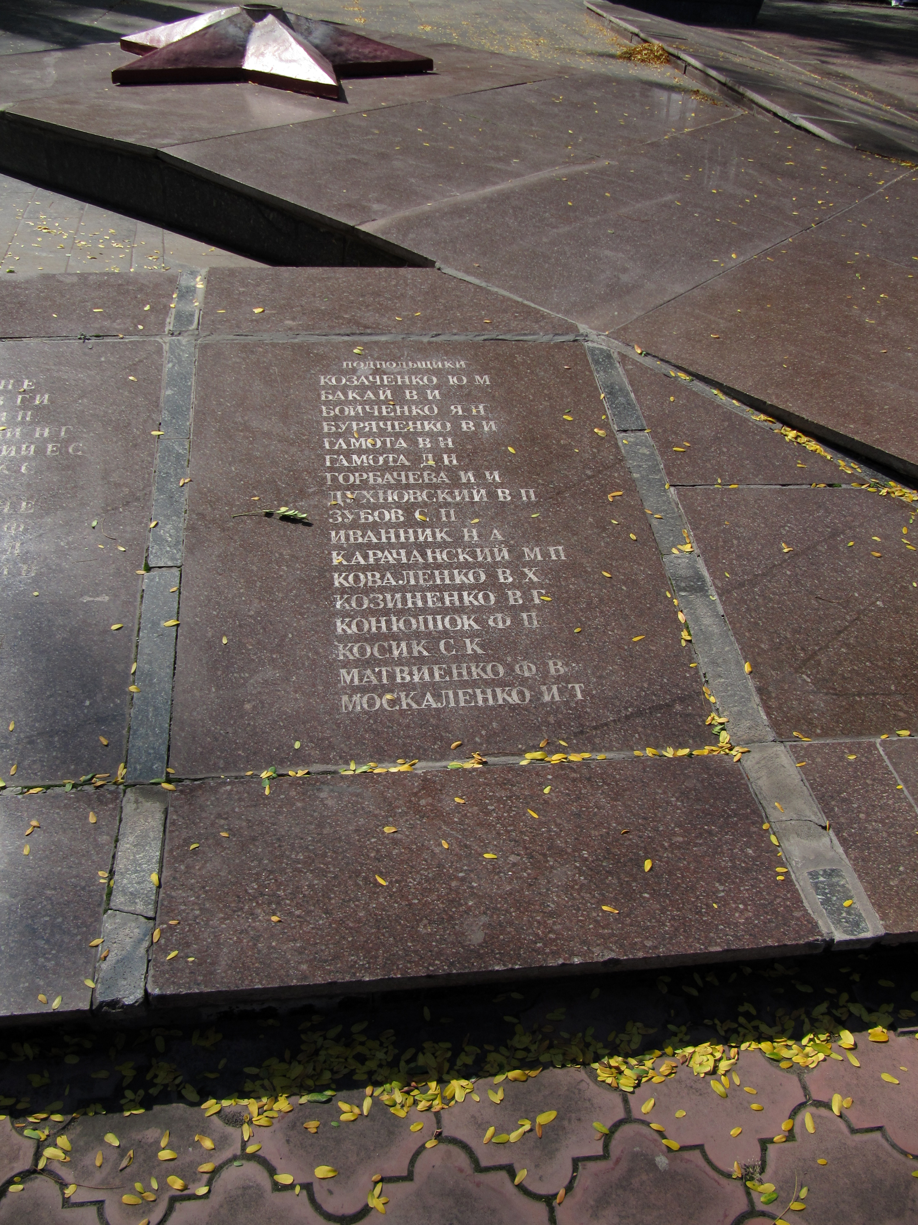 Братська могила загиблих воїнів та підпільників. Гранітна плита з прізвищами №1